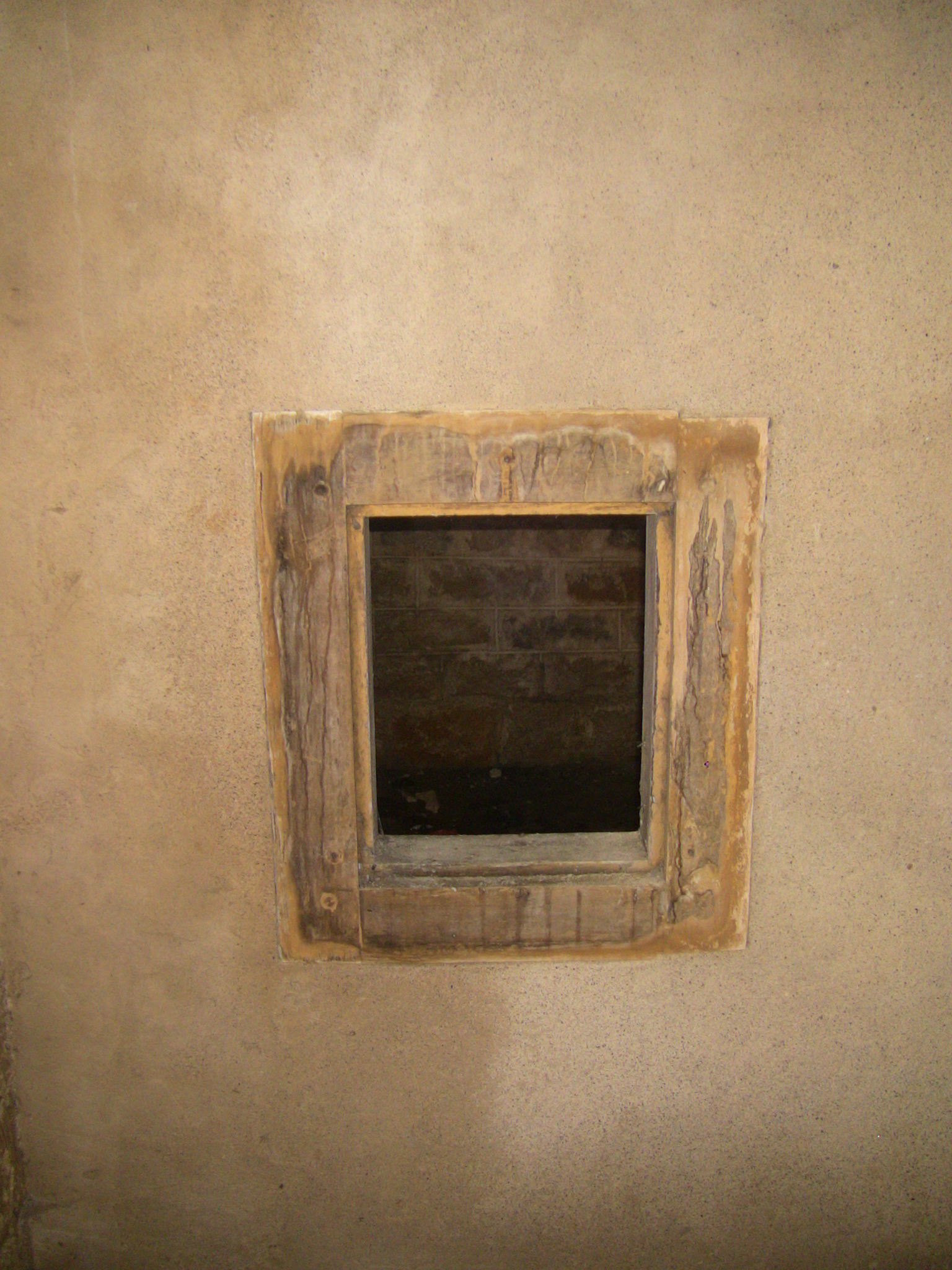 Détail d'une fenêtre d'une cloison de la batterie de mortiers du fort de Planoise, à Besançon (Doubs, France).